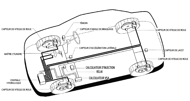 Desription sommaire des composants d'un système VSA Classique.